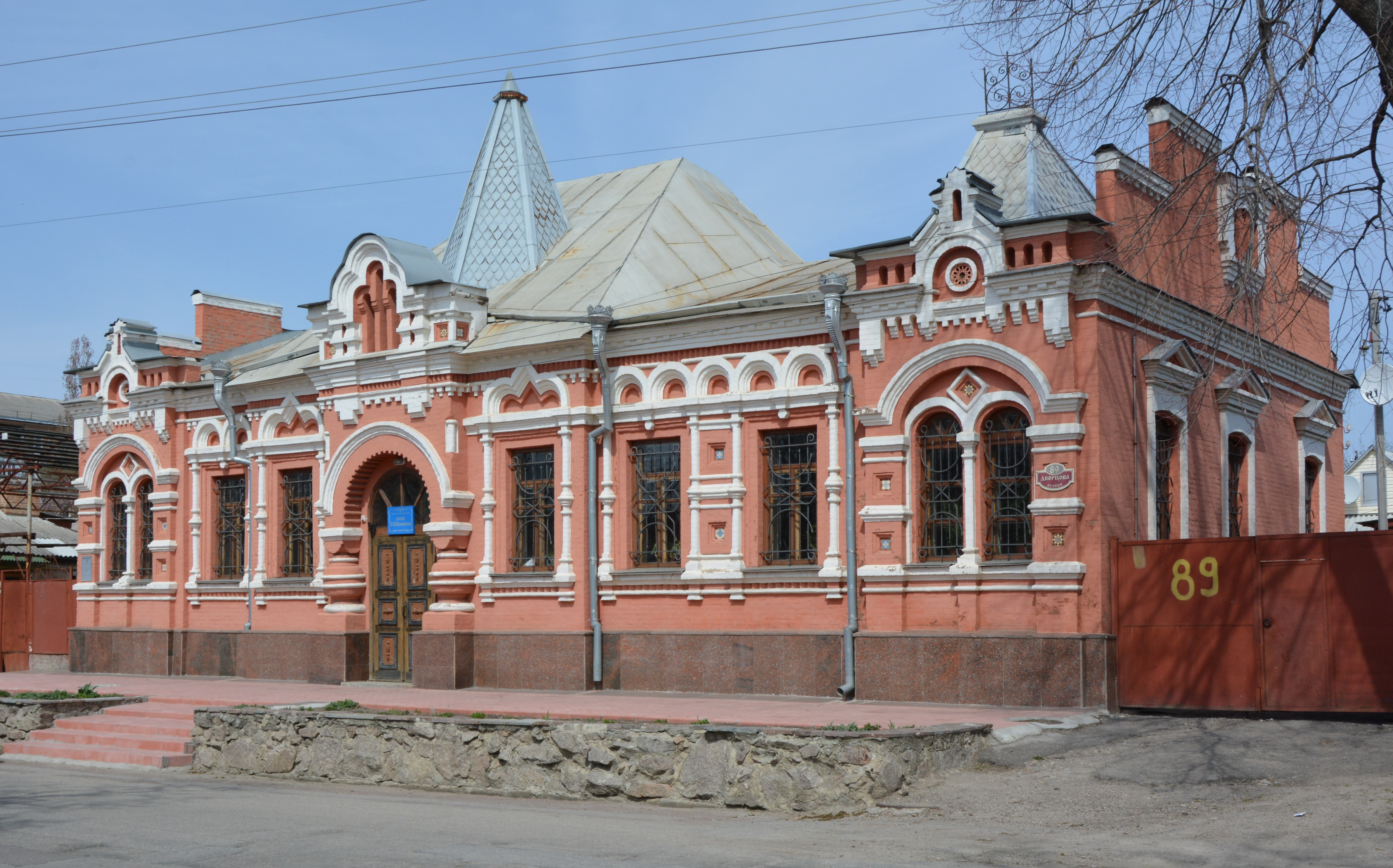 Будинок Я. В. Паученка, в жив художник О. О. Осмьоркін, Кіровоград, вул. Дворцова, 89